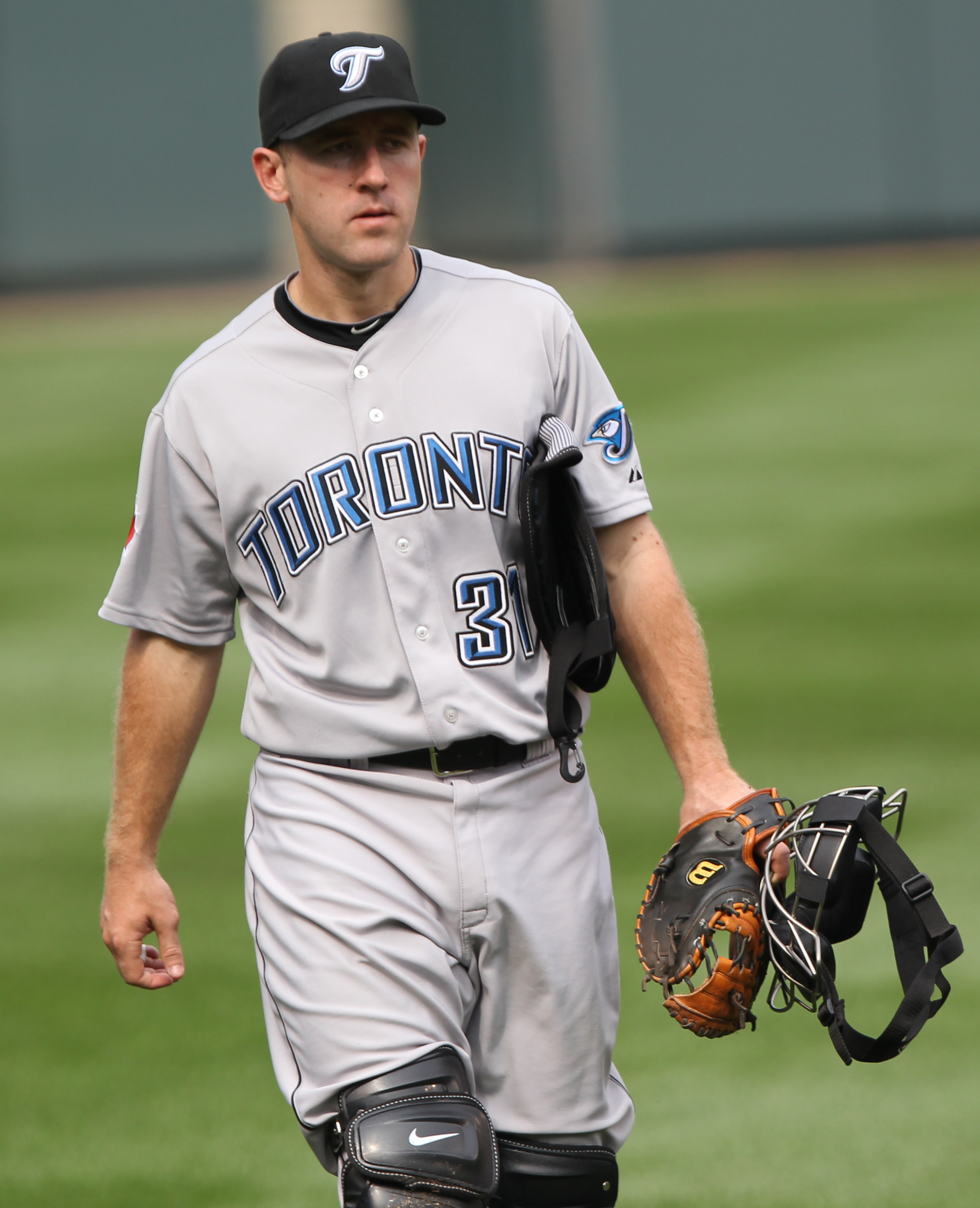 Brian Jeroloman